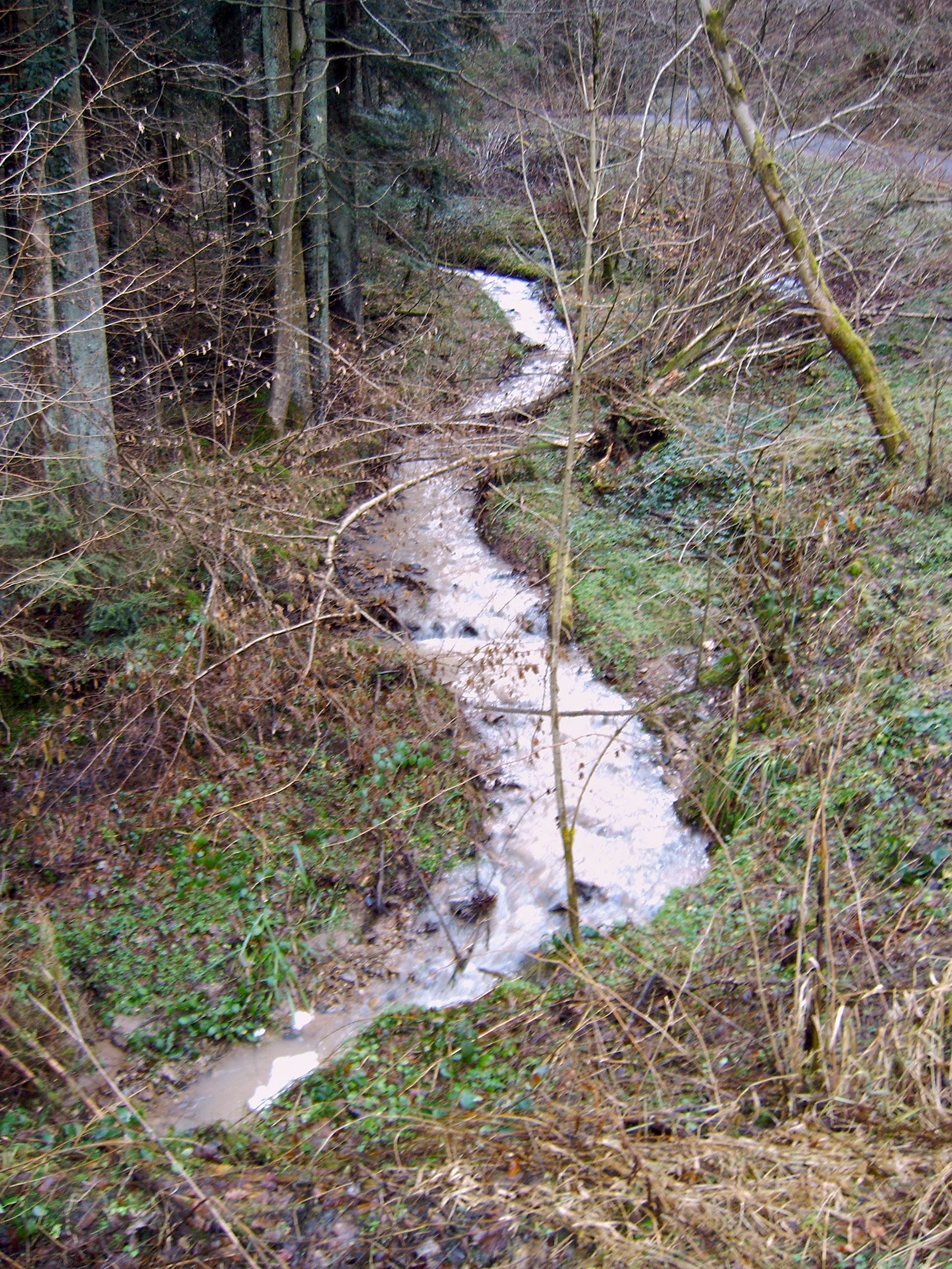 Muckenseebach, linker Zufluss der Rems, oberhalb des Muckensees